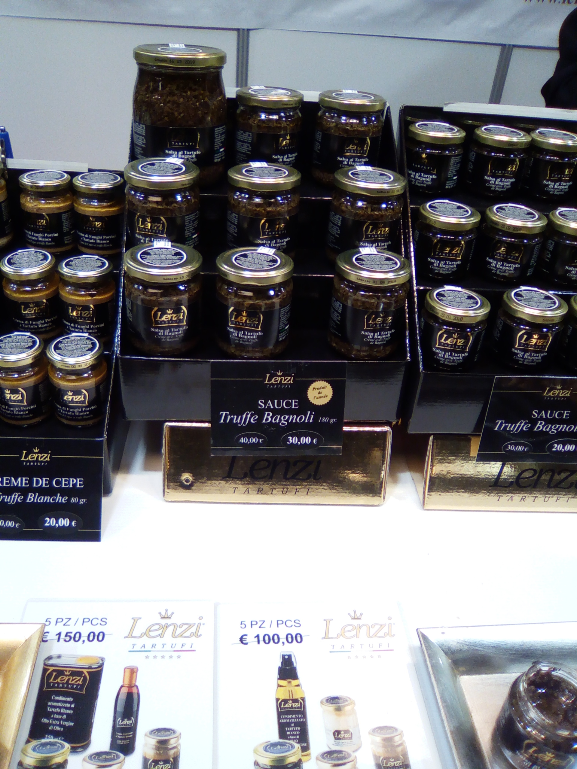 Salon Saveurs des Plaisirs gourmands.